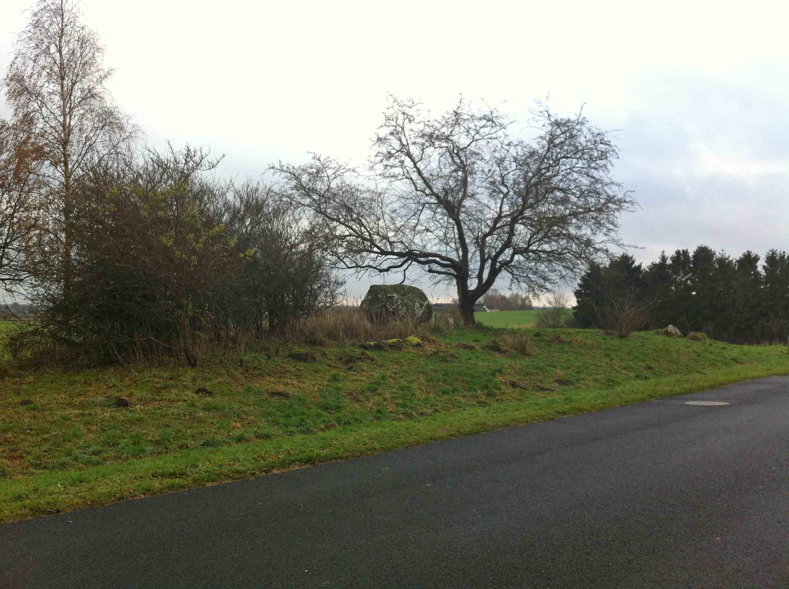 Langdysse i Døjringe